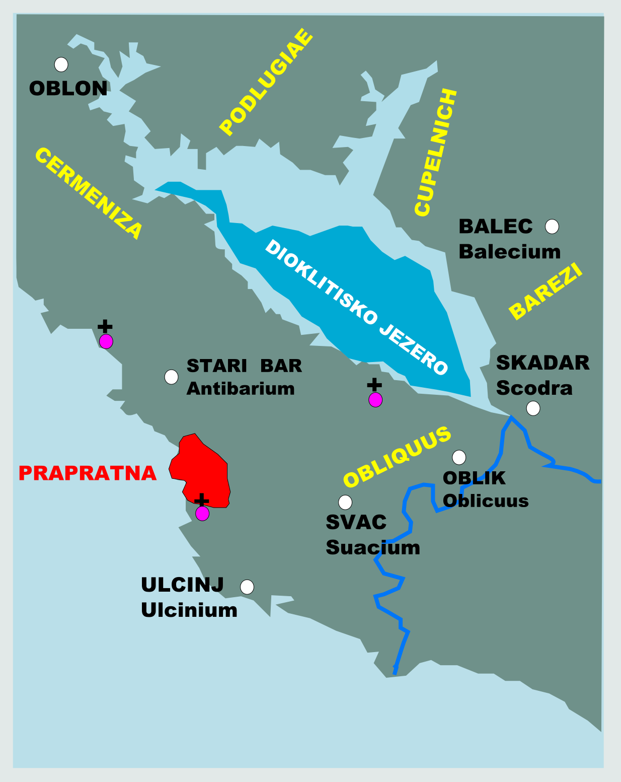 Prapratna župa i Jezerske župe u XI vijeku.